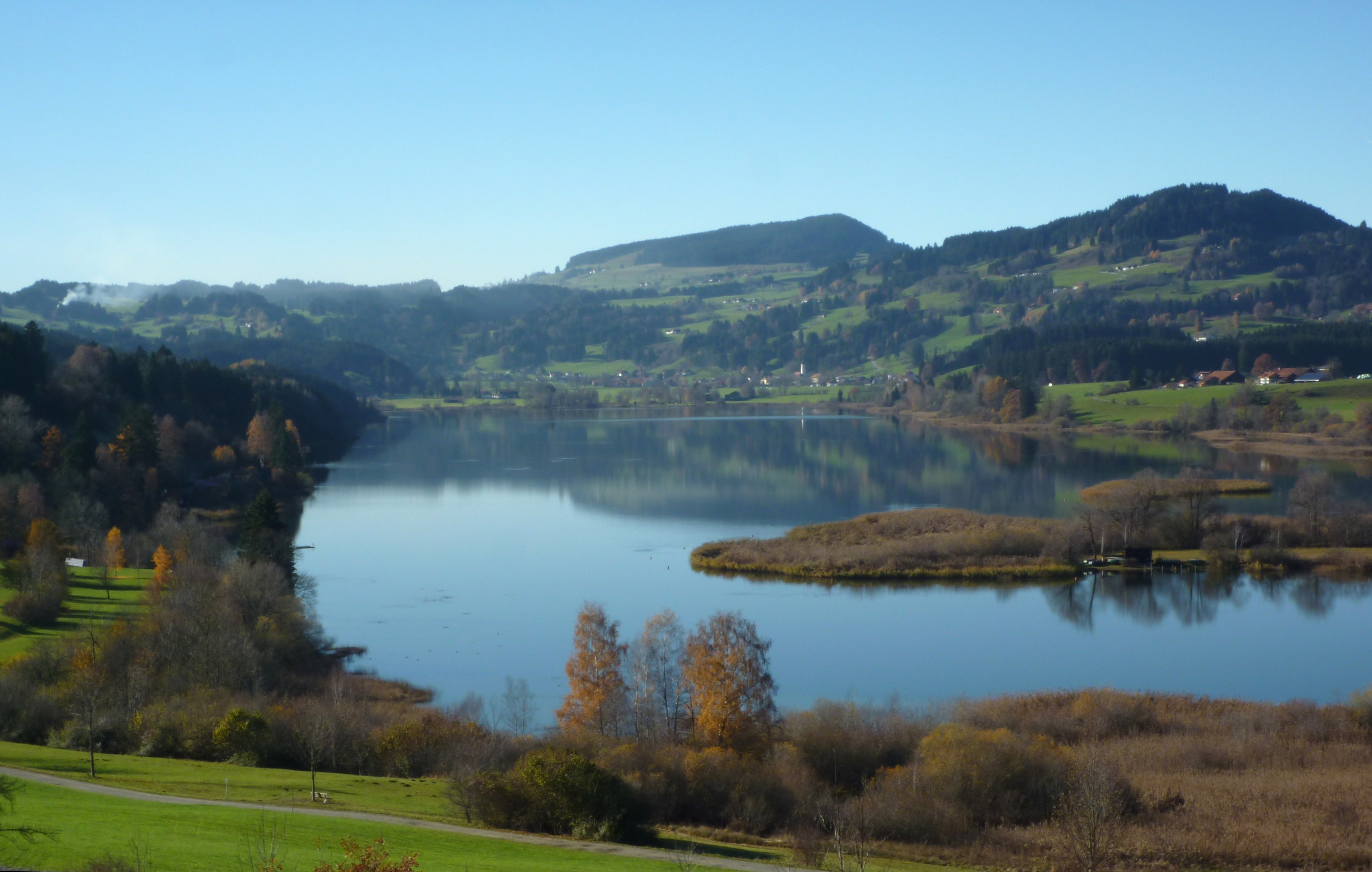 Waltenhofen - Niedersonthofener See und Stoffelberg